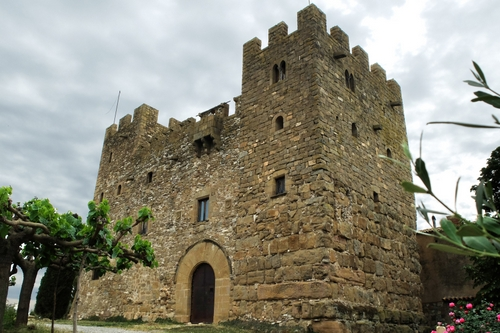 castell La Ràpita a Vallfogona de Balaguer - Noguera / Lleida - Catalunya